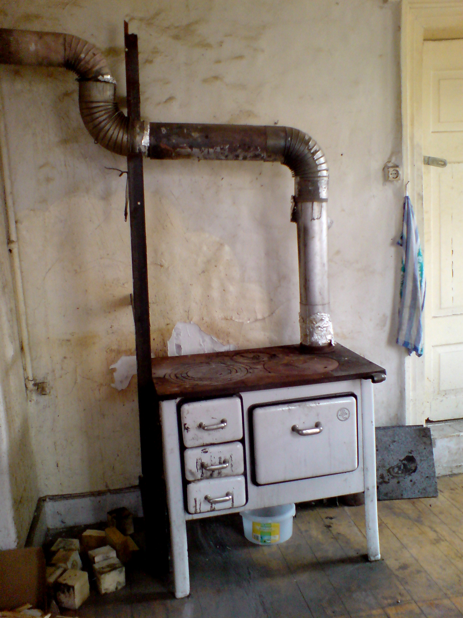 Eine Kochmaschine im Gartenhaus Hannover, Am Judenkirchhof 11c. Ob sie beschlagnahmt wurde für die Übergangsherberge der Vertriebenen aus Ostpreussen und Schlesien stammt, ob "Nostalgie" oder schlicht einer pfiffigen Armut späterer Bewohner geschuldet?